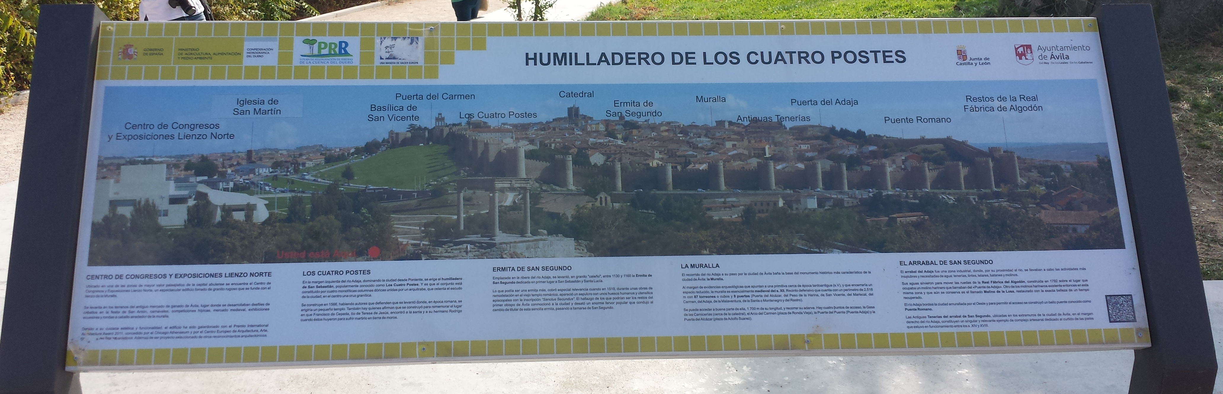 Erläuterungen zum Aussichtspunkt Los Cuatro Postes in Ávila